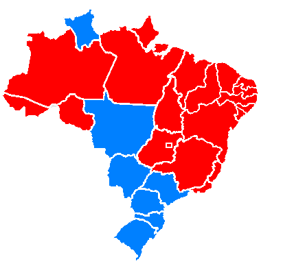 Com 100% dos votos apurados no segundo turno: Vermelho: Estados onde Lula venceu Azul: Estados onde Geraldo Alckmin venceu